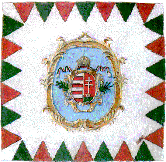 Flaga batalionu honwedów (Muzeum Historii Wojskowości)